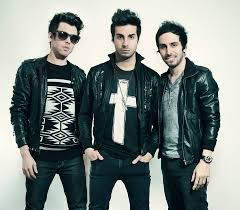 Cash Cash FOTO